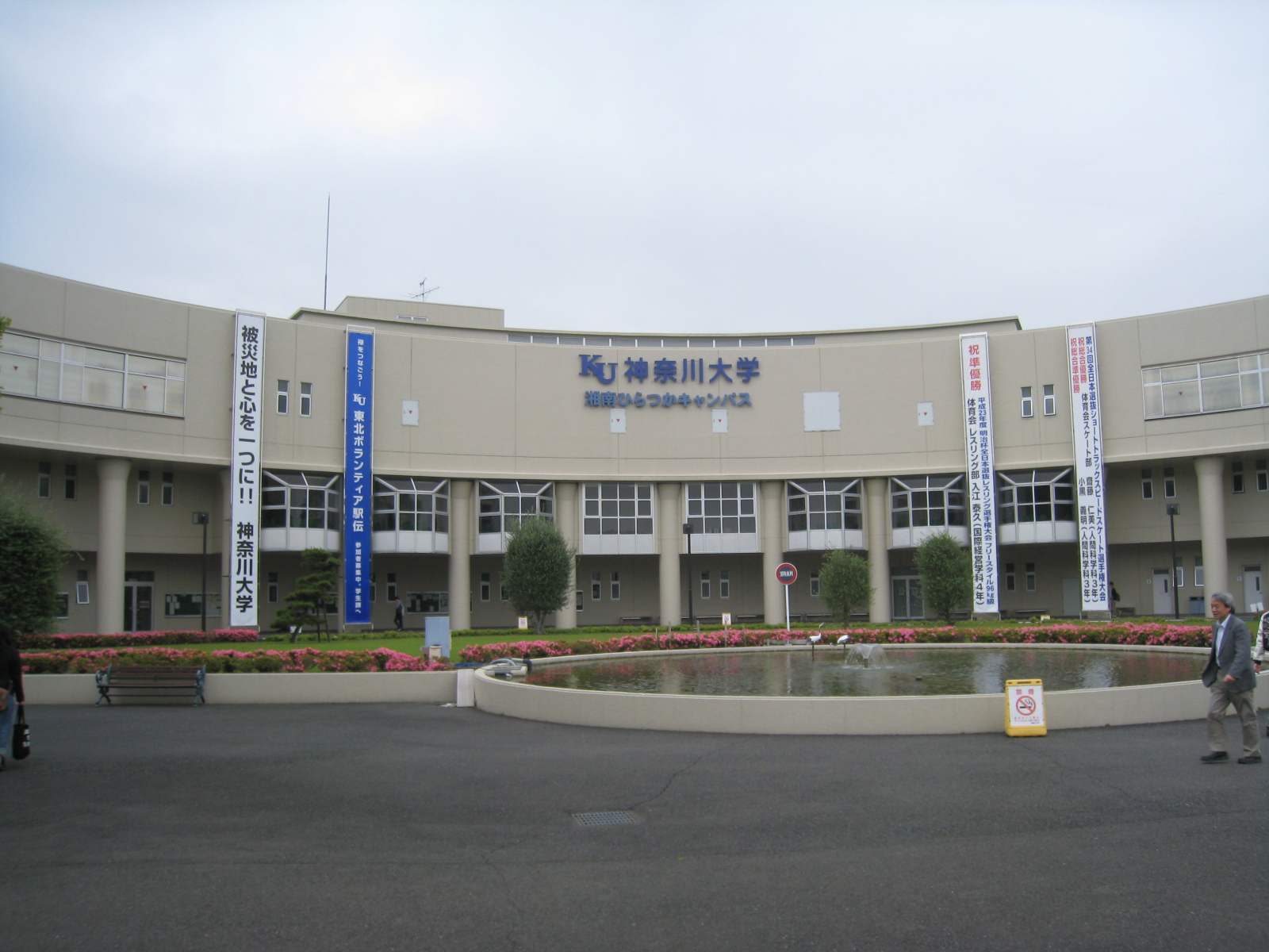 神奈川大学湘南ひらつかキャンパス１号館